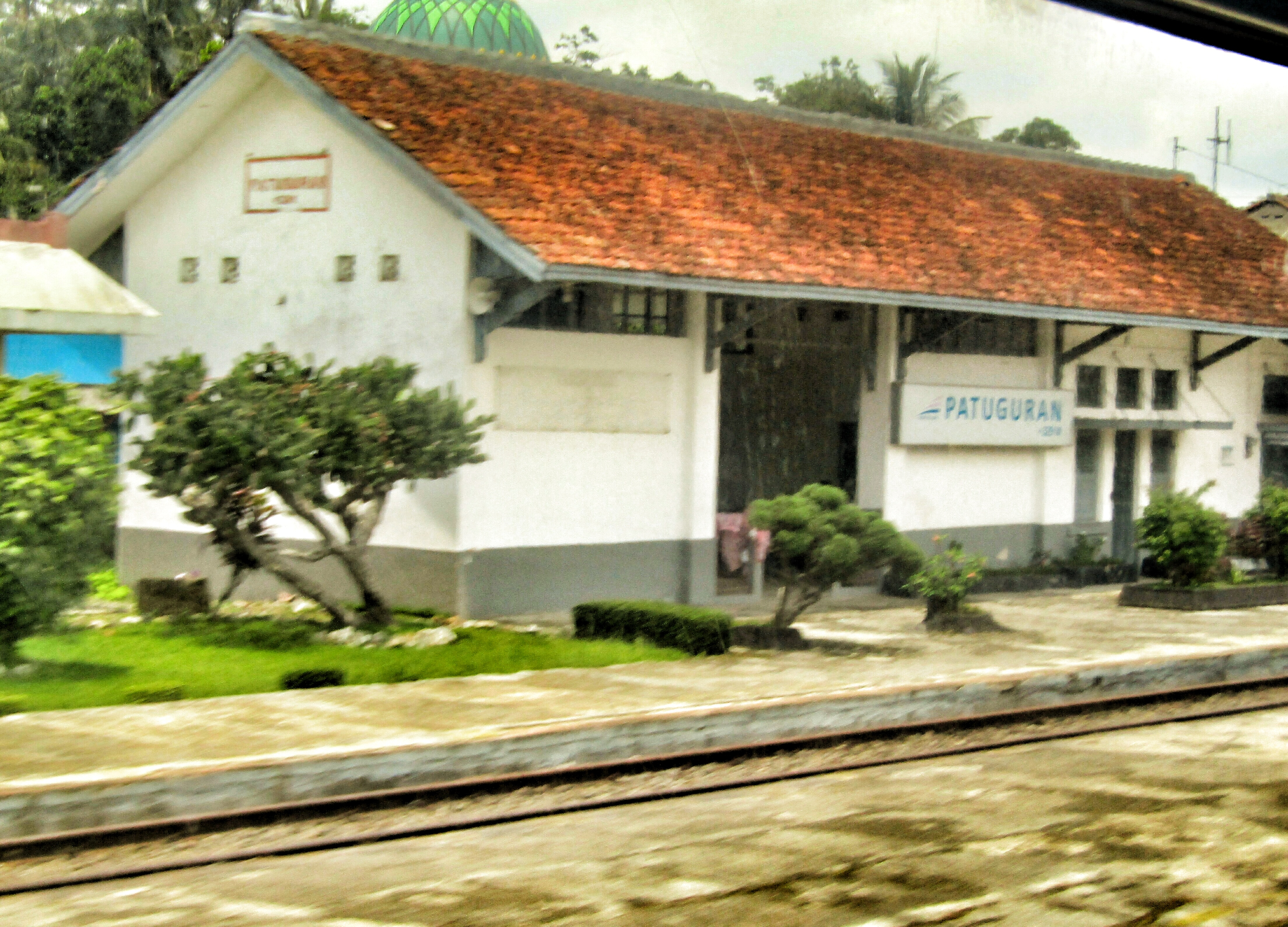 Tampak peron Stasiun Patuguran, 2019